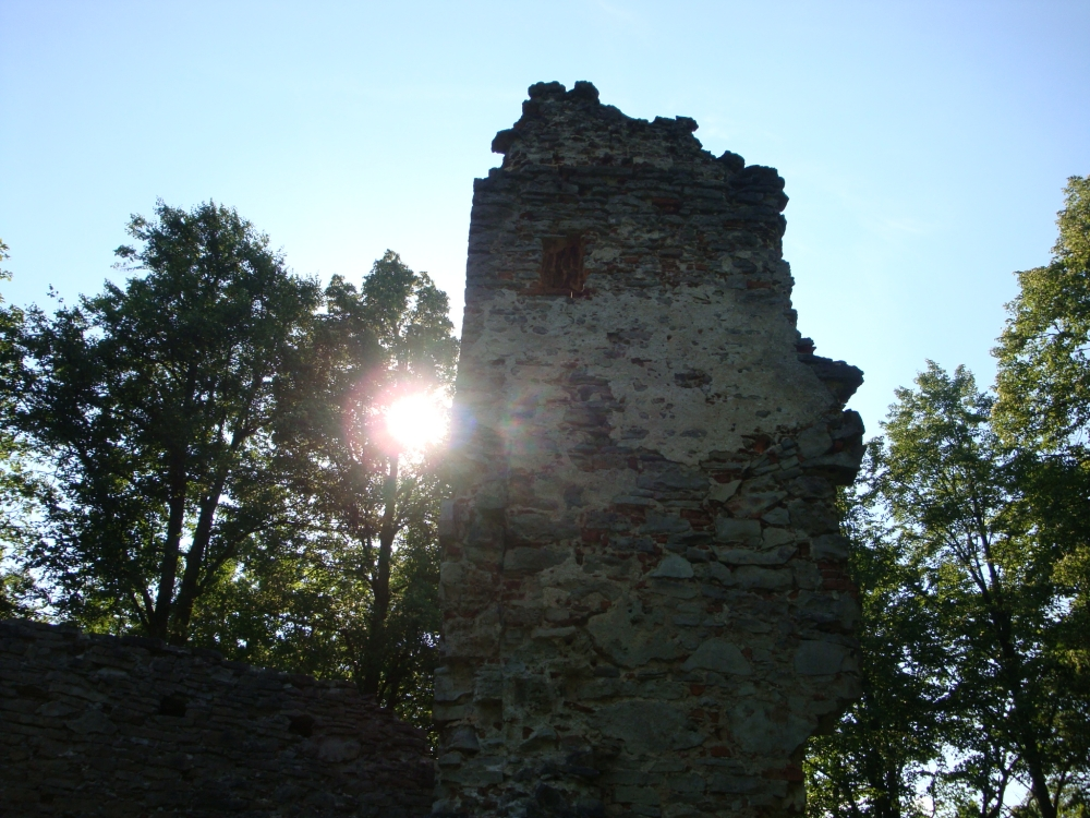 Konvendihoone varemed.